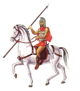 Վահան Մամիկոնյան.